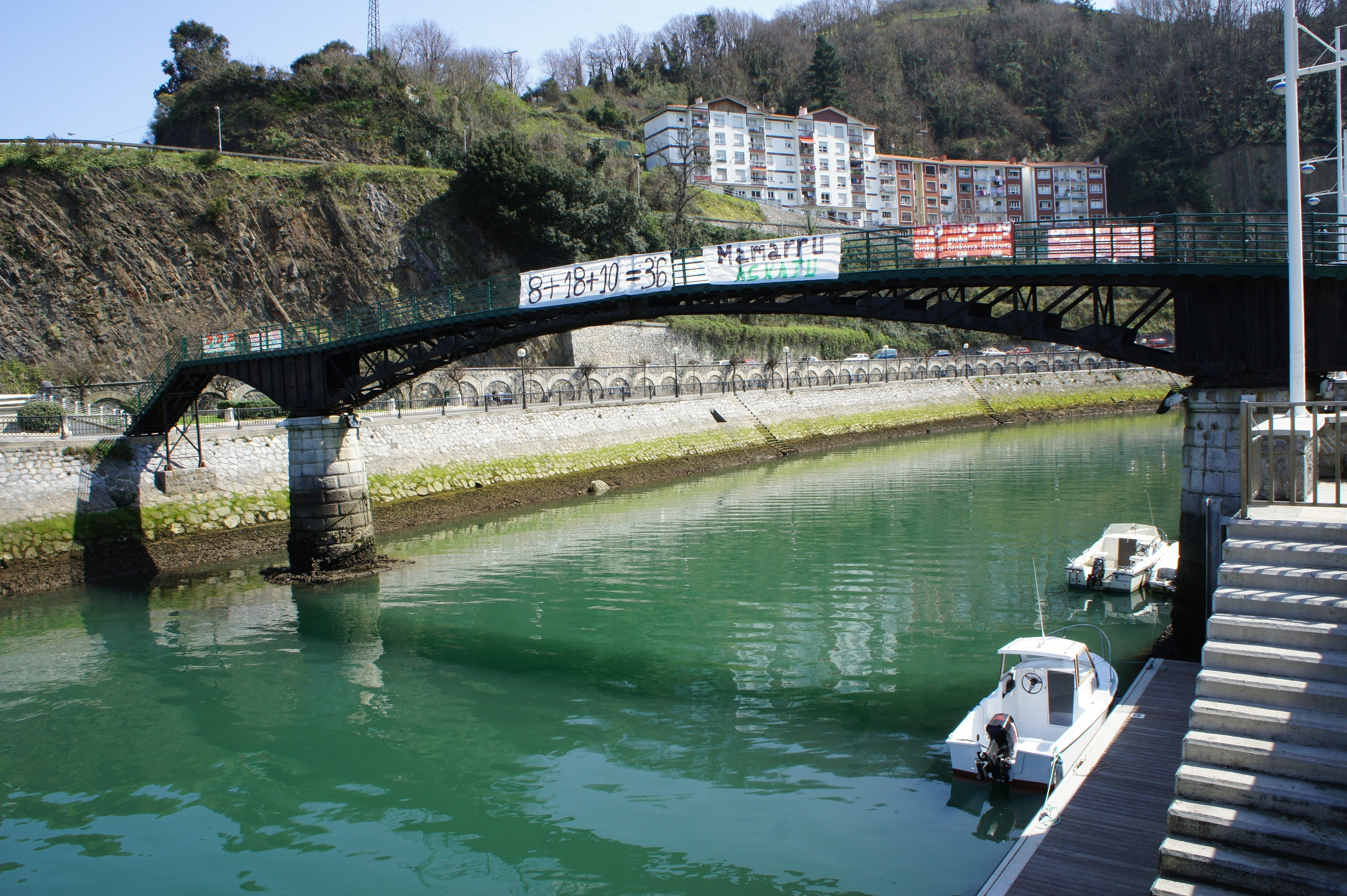 Pasarela de Alfonso XIII